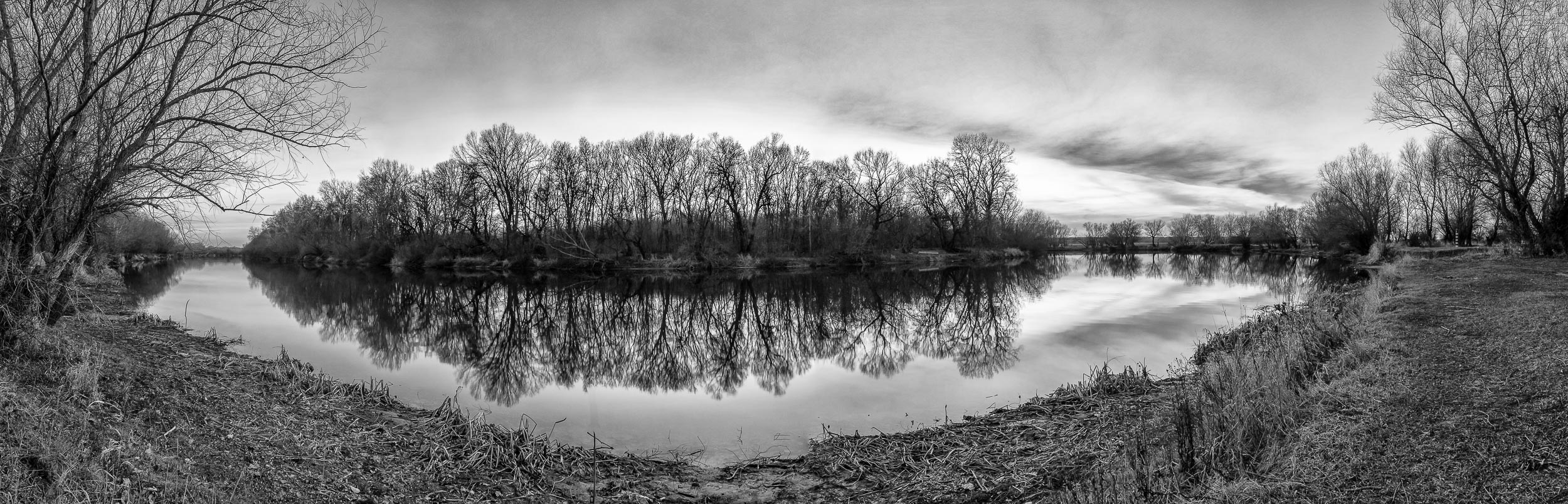 Вечір на річці Турунчук